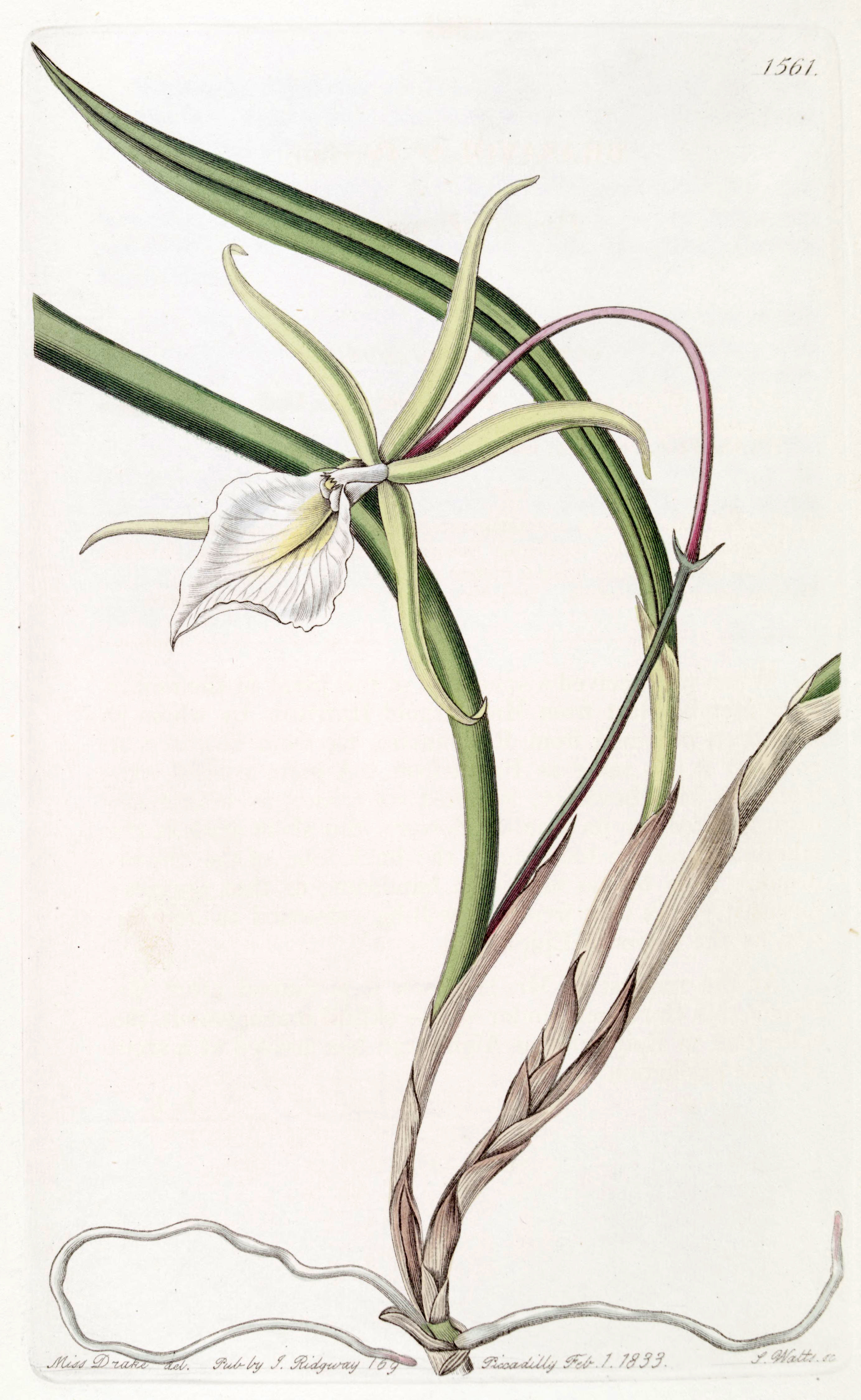 Brassavola tuberculata (as syn. Brassavola perrinii)